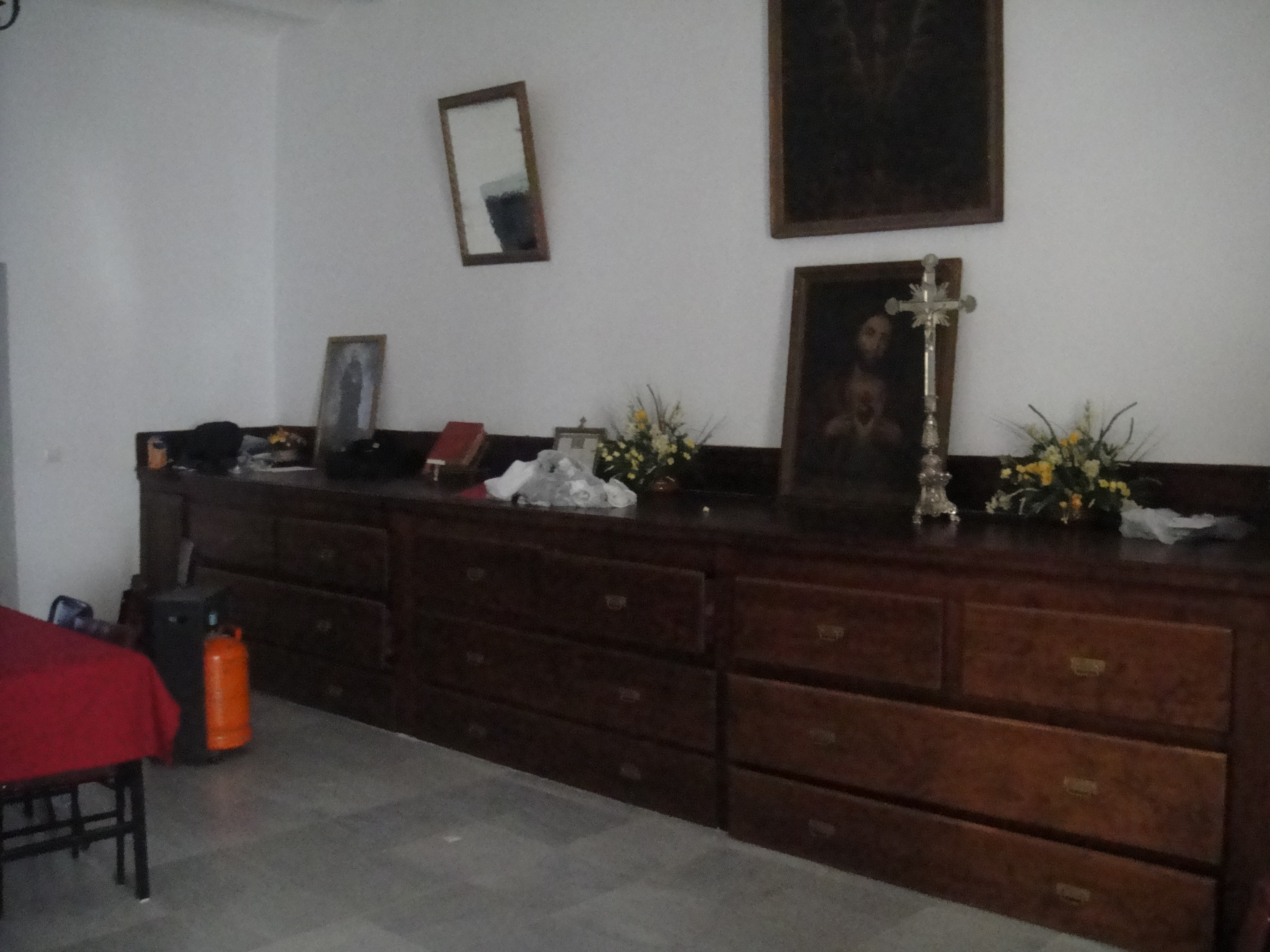 Cajonería de la sacristía de la iglesia de Nuestra Señora del Castillo de Fuente Obejuna, provincia de Córdoba, (España).